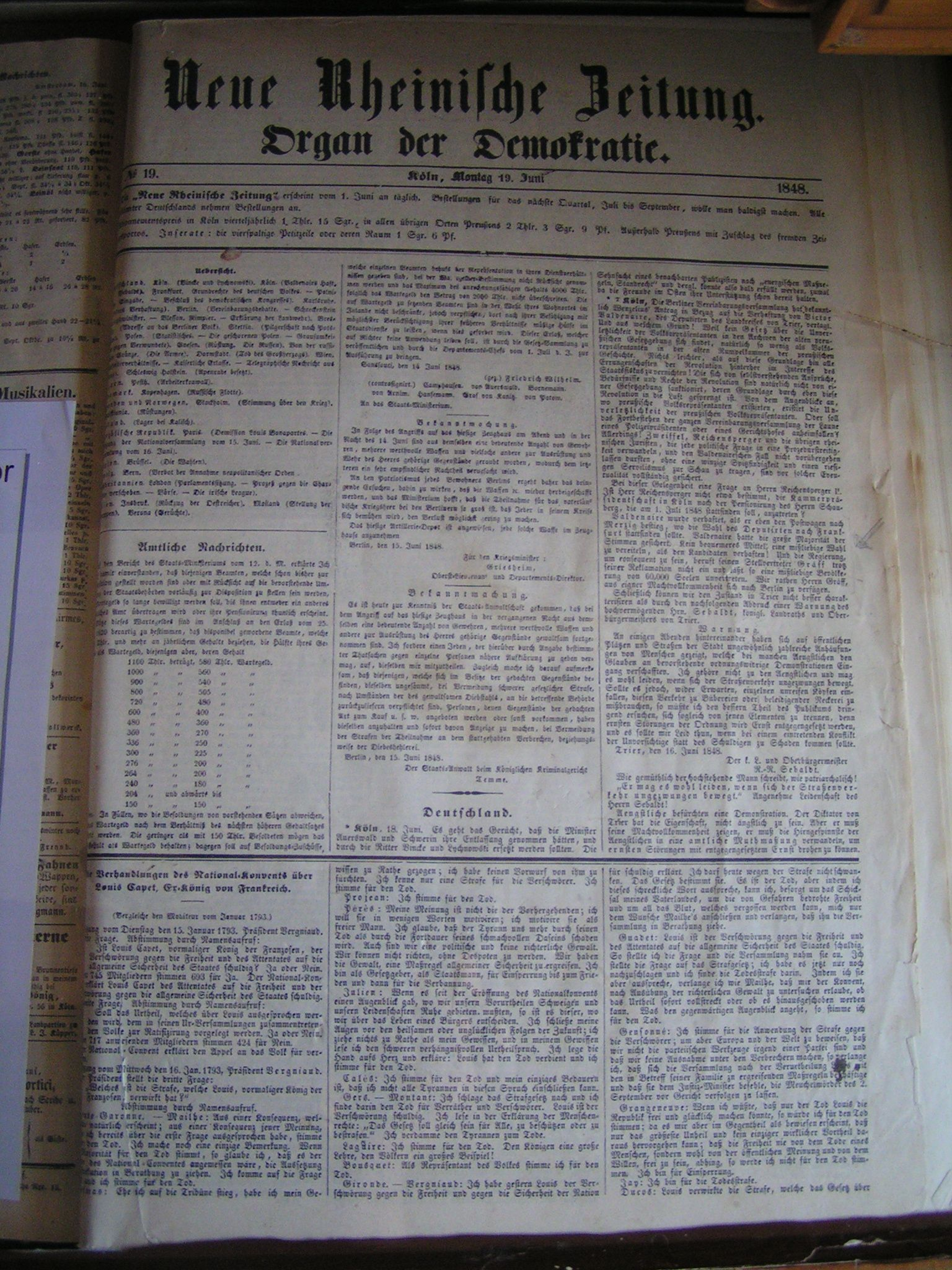 Neue_Rheinische_Zeitung